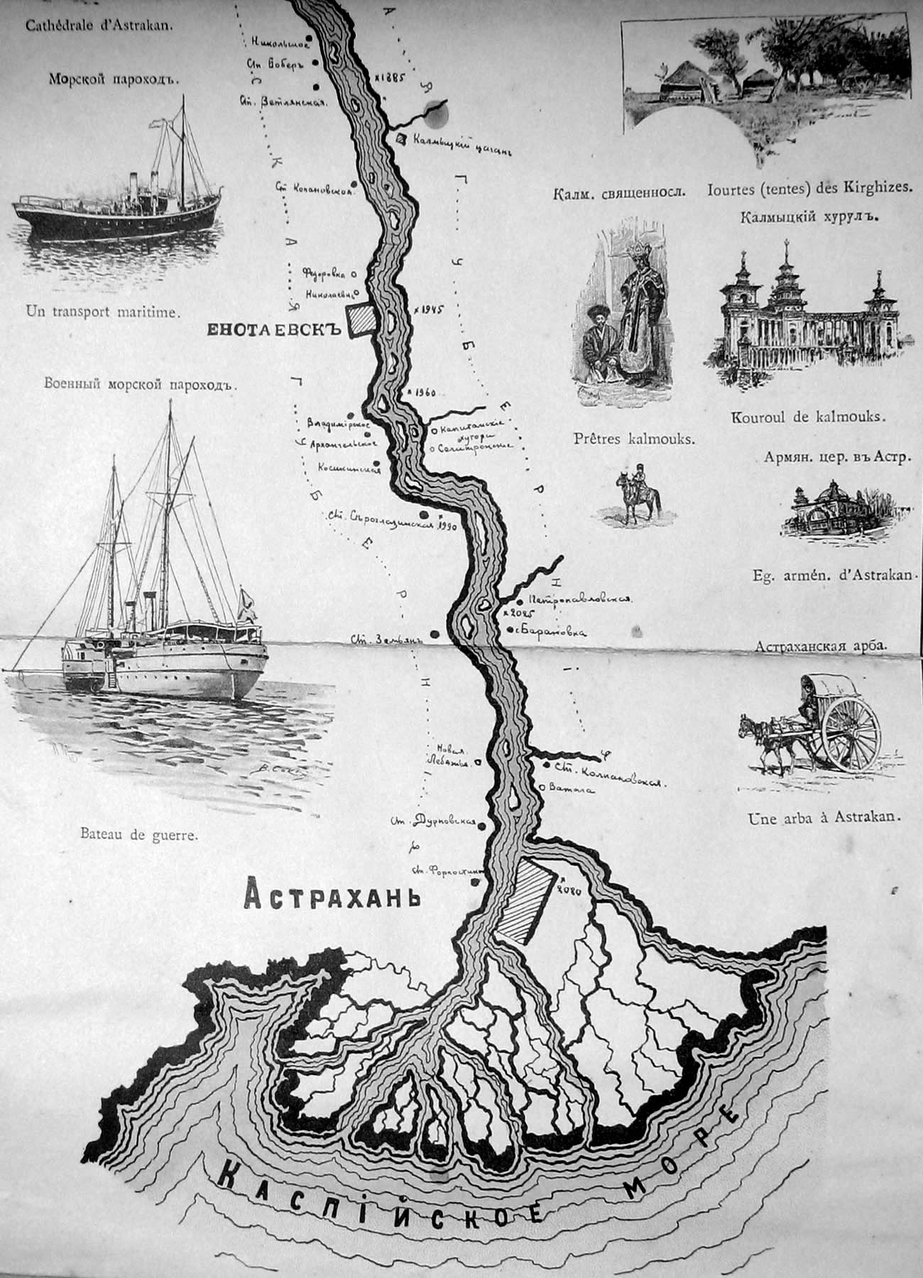 Волга в районе Астрахани